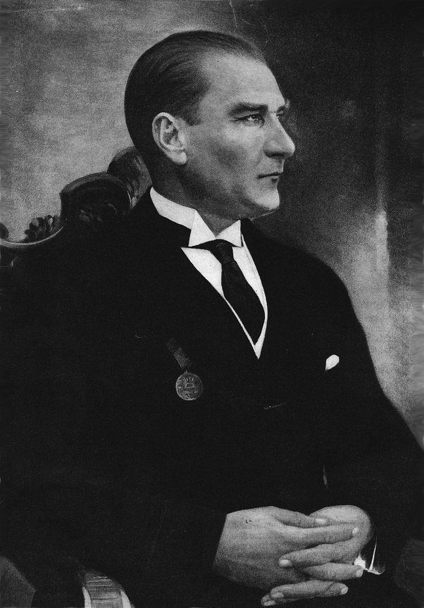 Mustafa Kemal Atatürk (1881 – 1938)